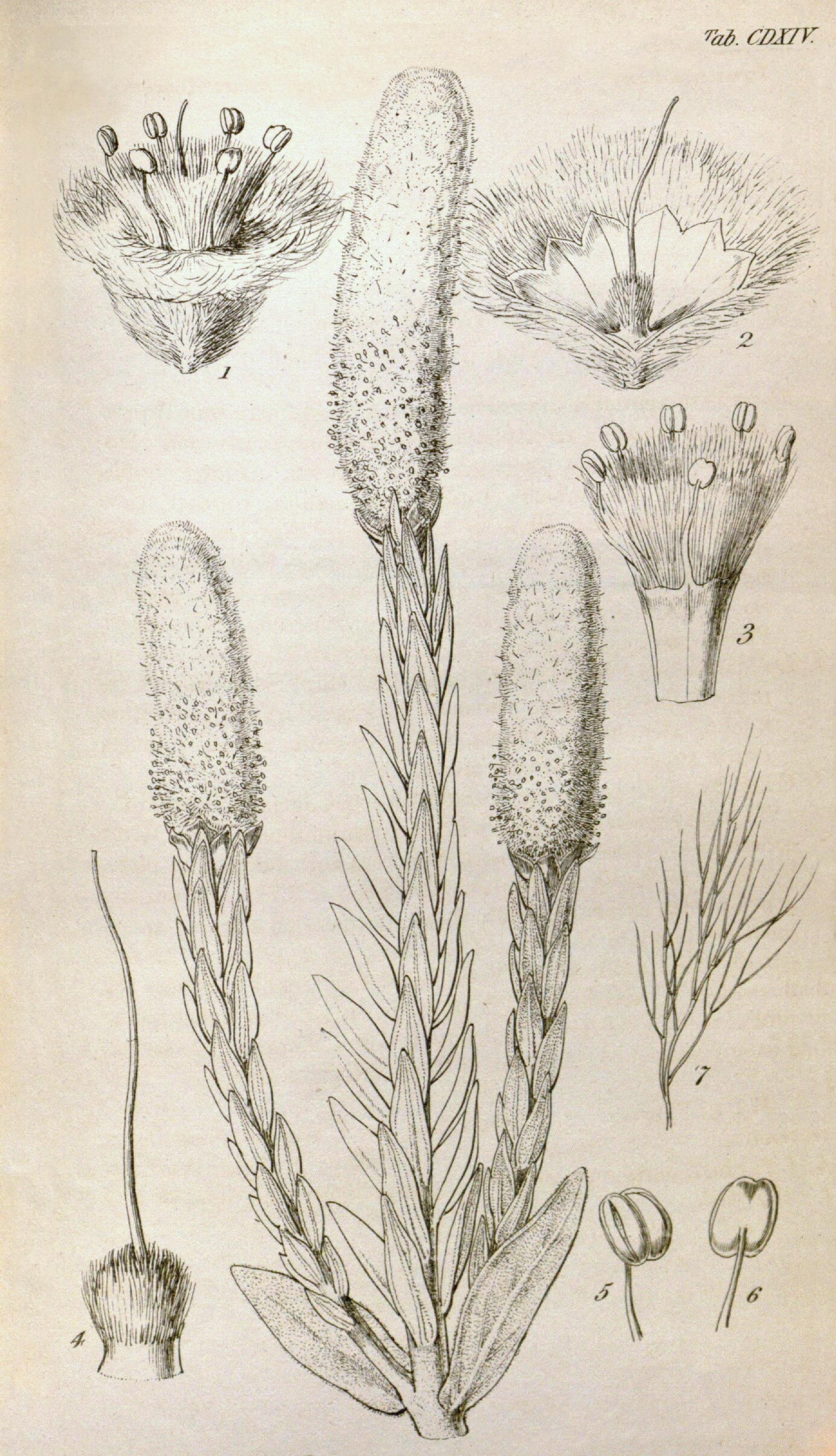 Lachnostachys albicans en William Jackson Hooker, Icones plantarum, vol. 5: t. 414 (1842) - 1: flor, 2: perianto abierto (sin estambres), 3: estambres, 4: pistil, 5-6: anteras, 7: detalle de la indumenta lanuda del perianto.